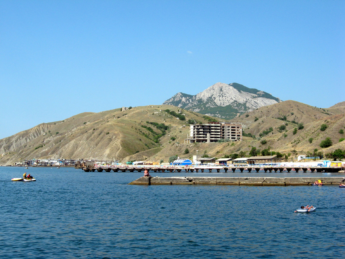 Kurortnoe 2009